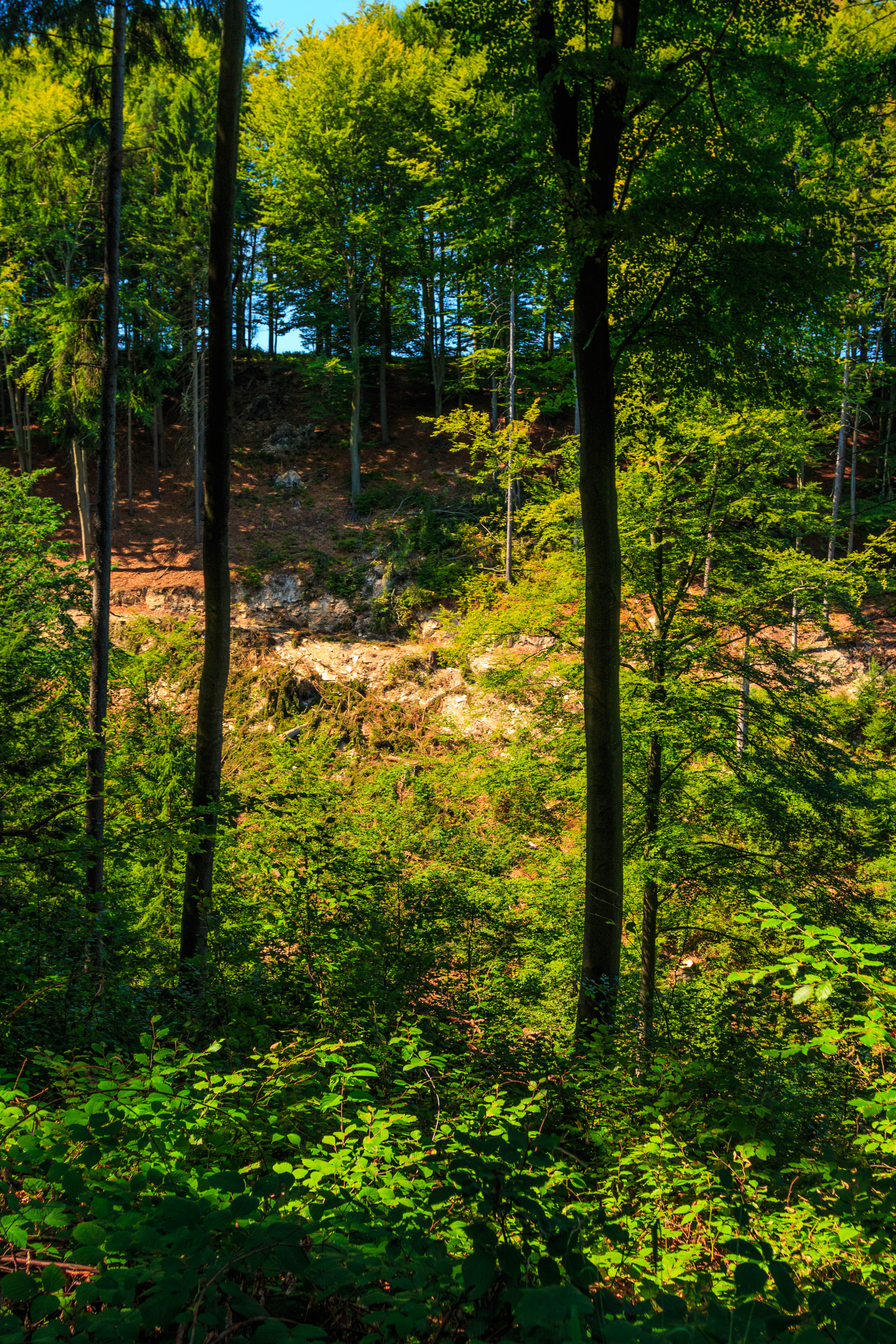 PP Střítěžská rokle Project: Chráněná území.